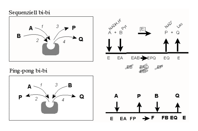 Zum Artikel selbst angefertigt Juergen Bode 10:04, 12. Dez 2004 (CET)